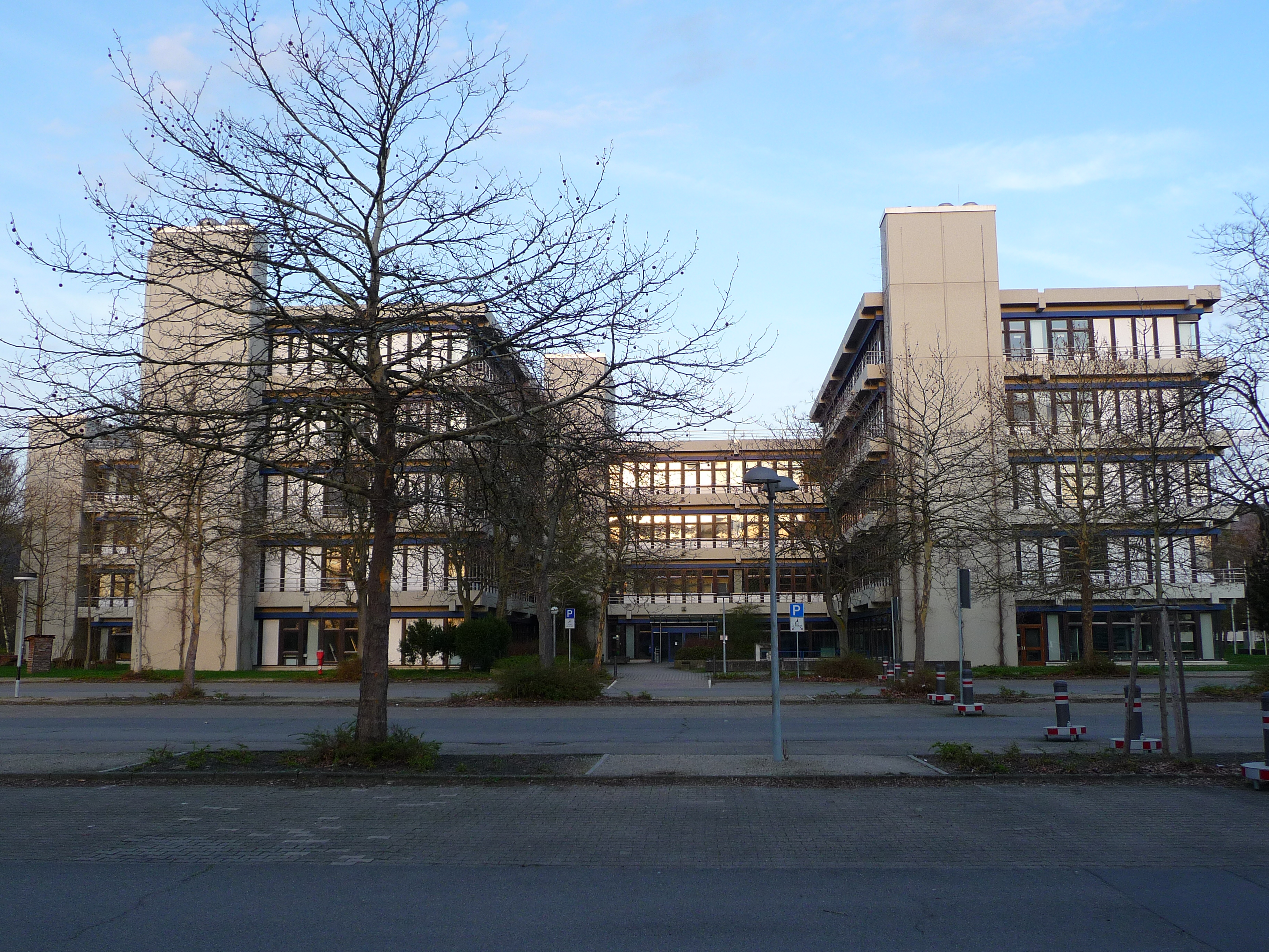 Pädagogische Hochschule im Neuenheimer Feld in Heidelberg (Baden-Württemberg, Deutschland)